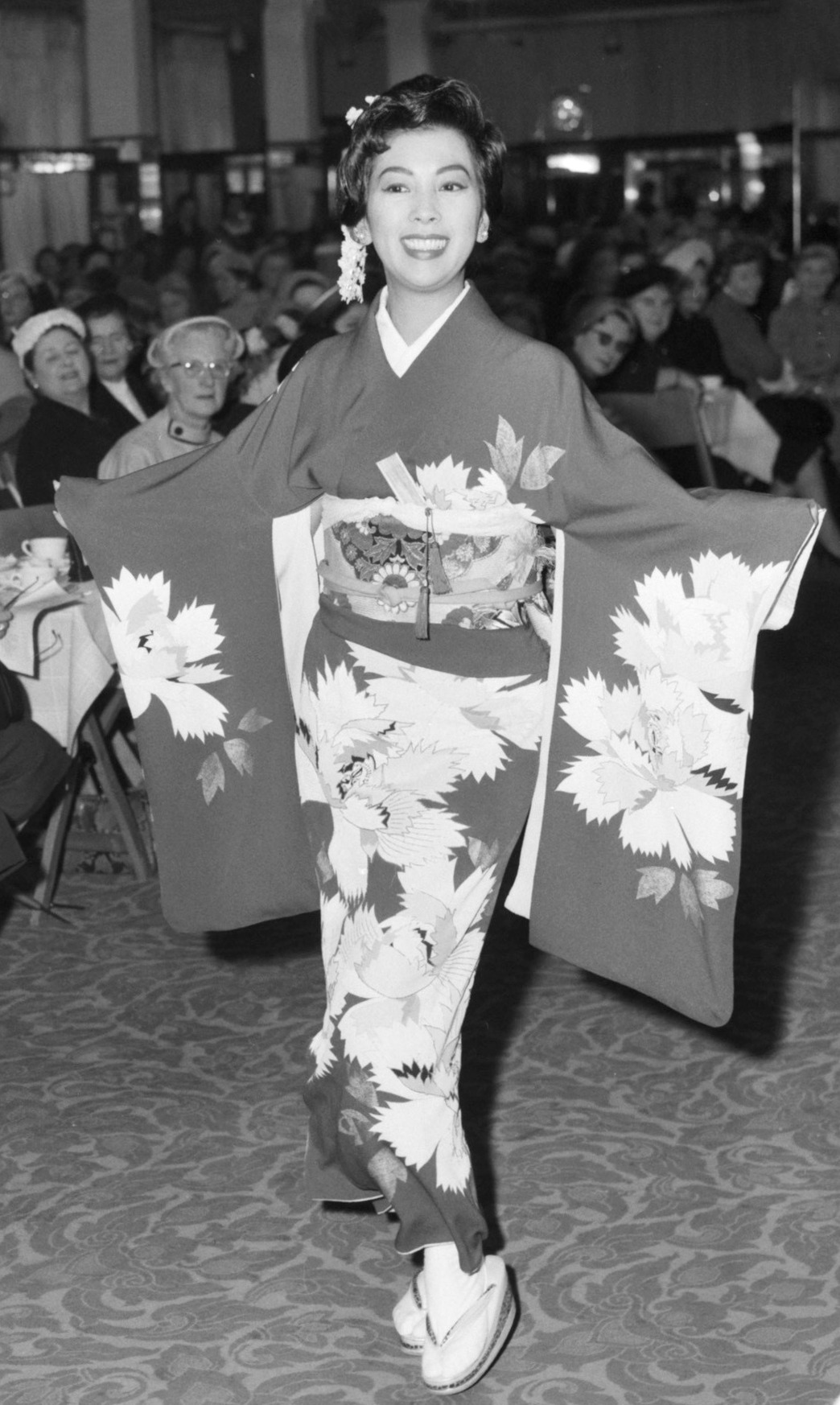 Bezoek van Miiko Taka aan Rotterdam, modeshow